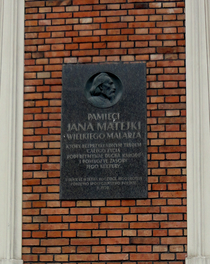 Jan Matejko-emléktábla a Krakkói Képzőművészeti Akadémia főépületének falán, Plac Jana Matejki